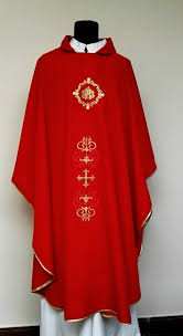 Casulla Roja